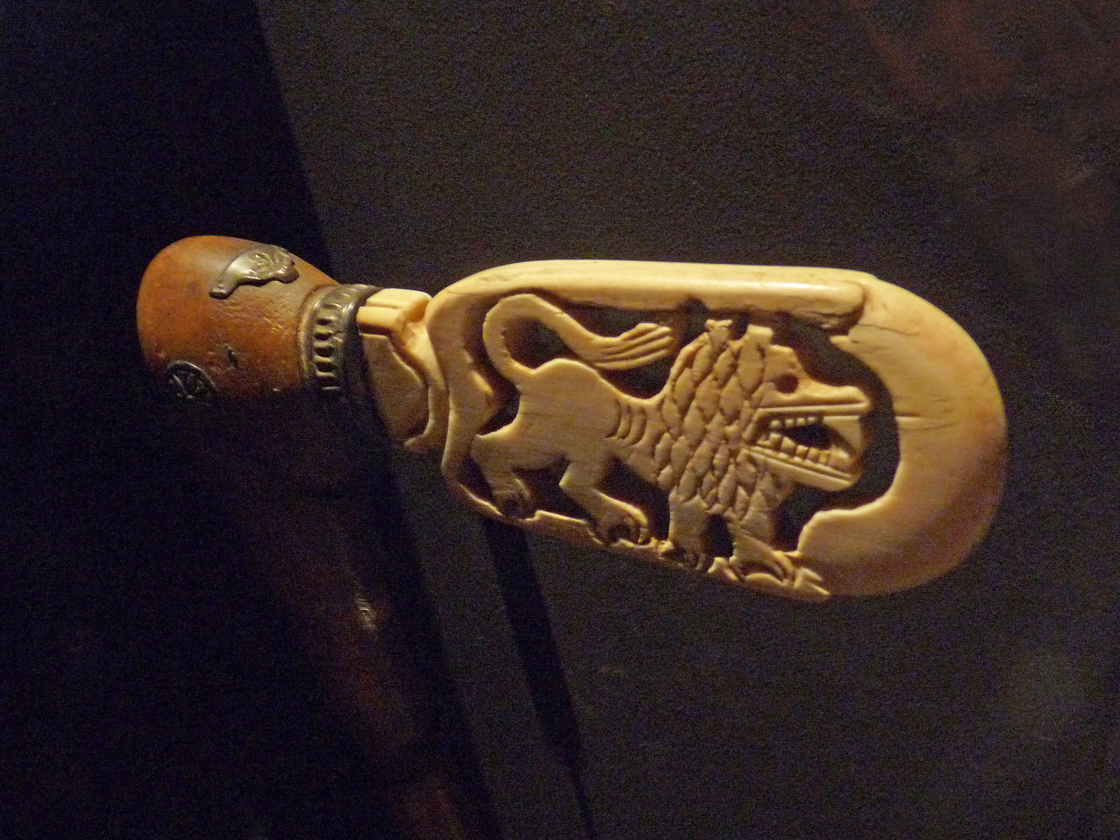 Extrémité en ivoire d'une récade, population Fon, Bénin, Dahomey, entre 1858 et 1889. Le lion utilisé comme armoiries et l'usage de matériaux précieux laissent à penser qu'elle a appartenu au roi Glélé. Musée du quai Branly.